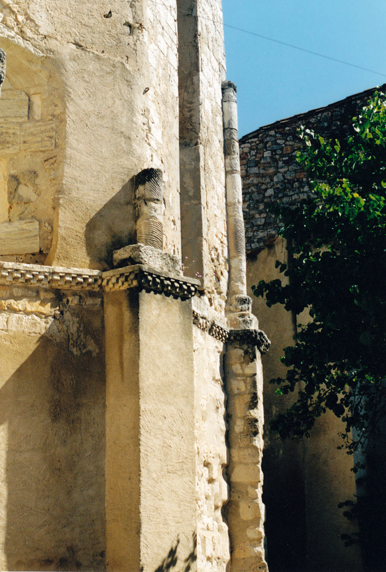 France - Languedoc - Aude - Église Saint-Martin de Fleury d'Aude